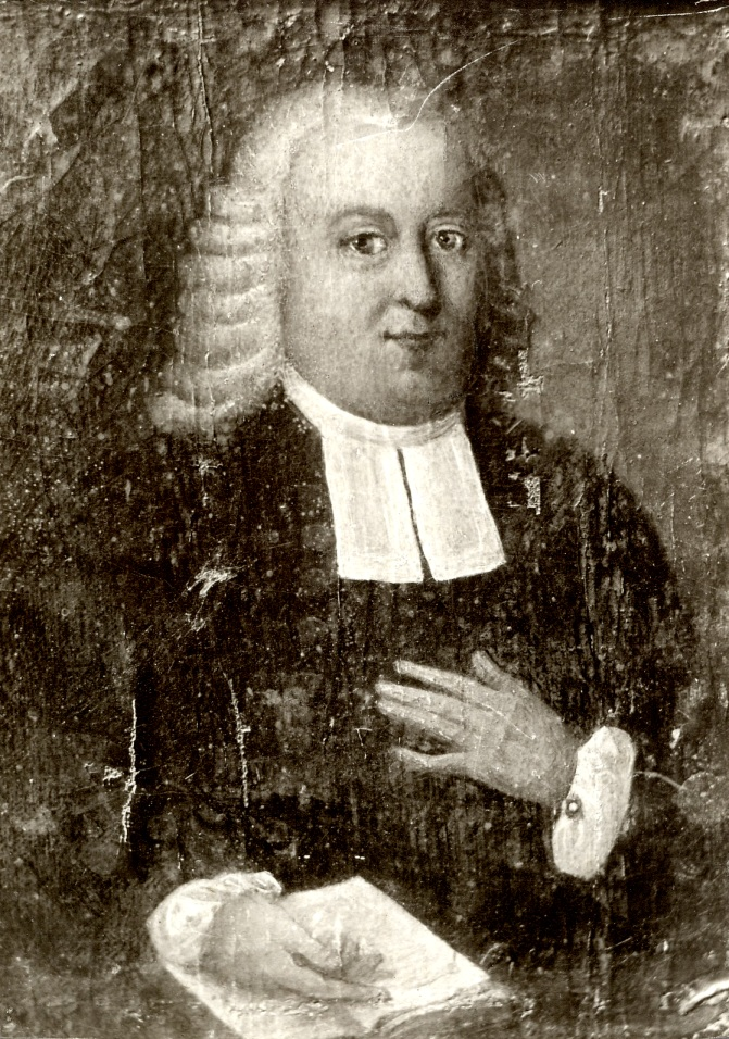 Eestimaa vaimulik Gotthard Johann Jäger